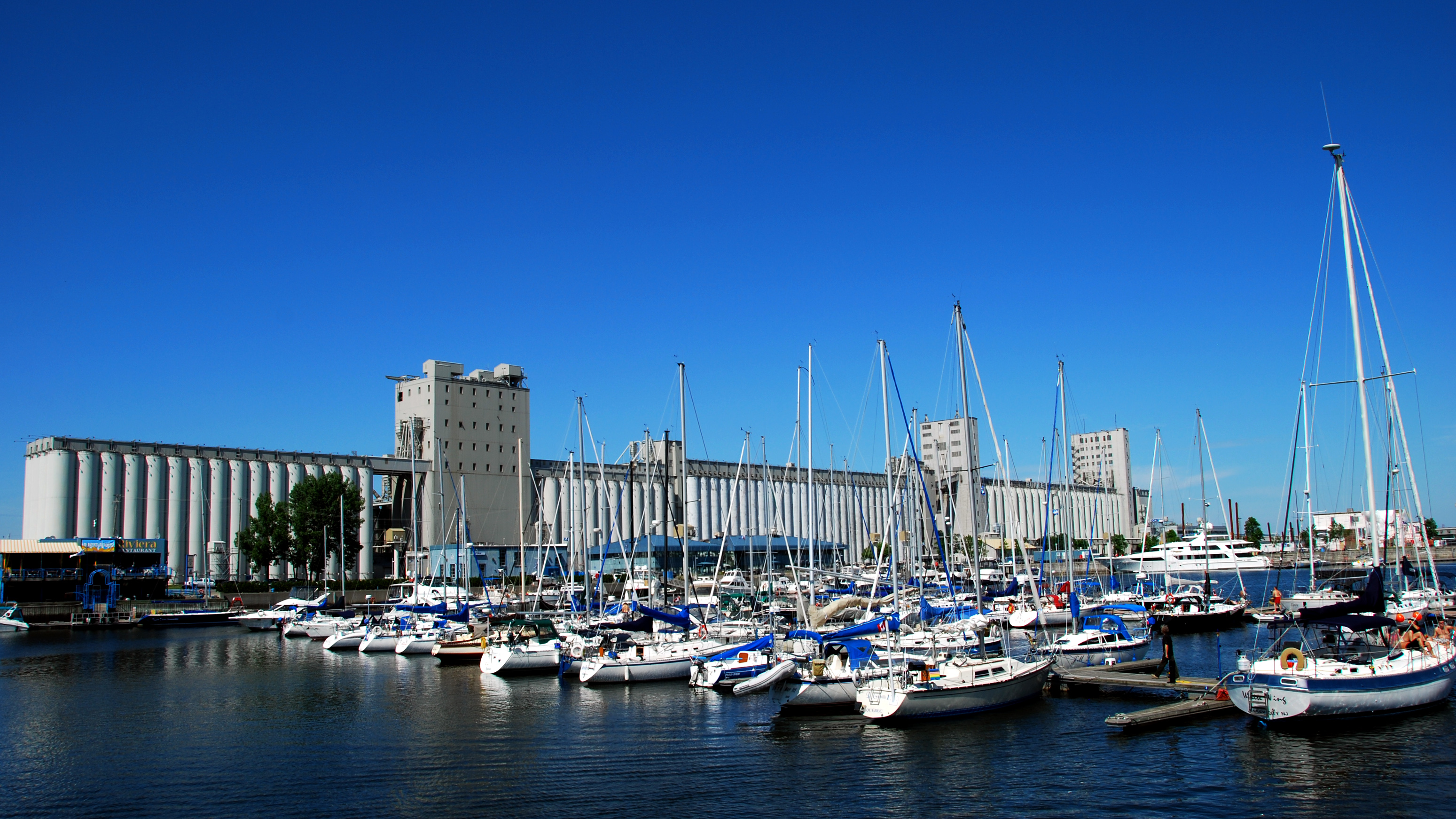 Marina de Québec et silos à grains de la compagnie Bunge, dans le vieux-port de Québec.